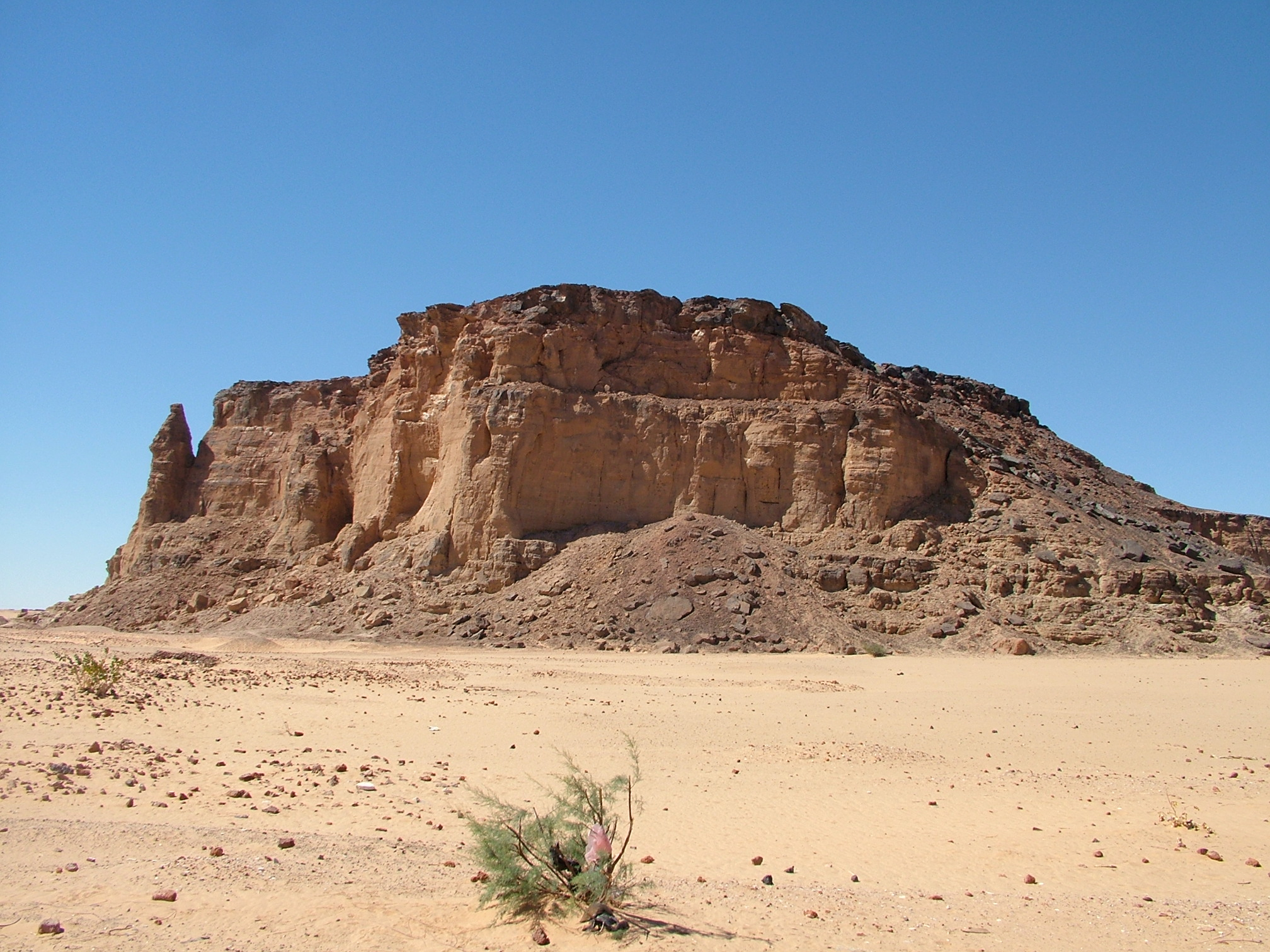 Gebel Barkal in Nubia (Sudan)